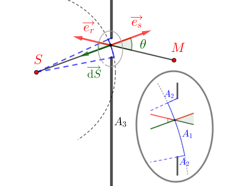 Illustration de la diffraction selon la théorie de Kirchhoff afin d'établir l'expression du facteur d'inclinaison ou d'oblicité.